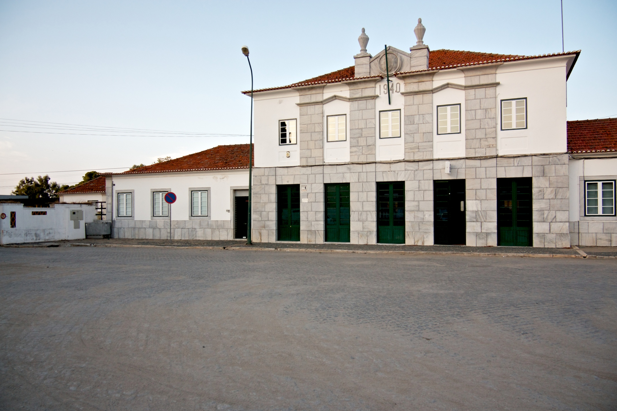 Tipo: E [ Estação ] Local: Beja [Linha do Alentejo , PK 153] Data e hora: 12 de Agosto de 2011 [19h59]